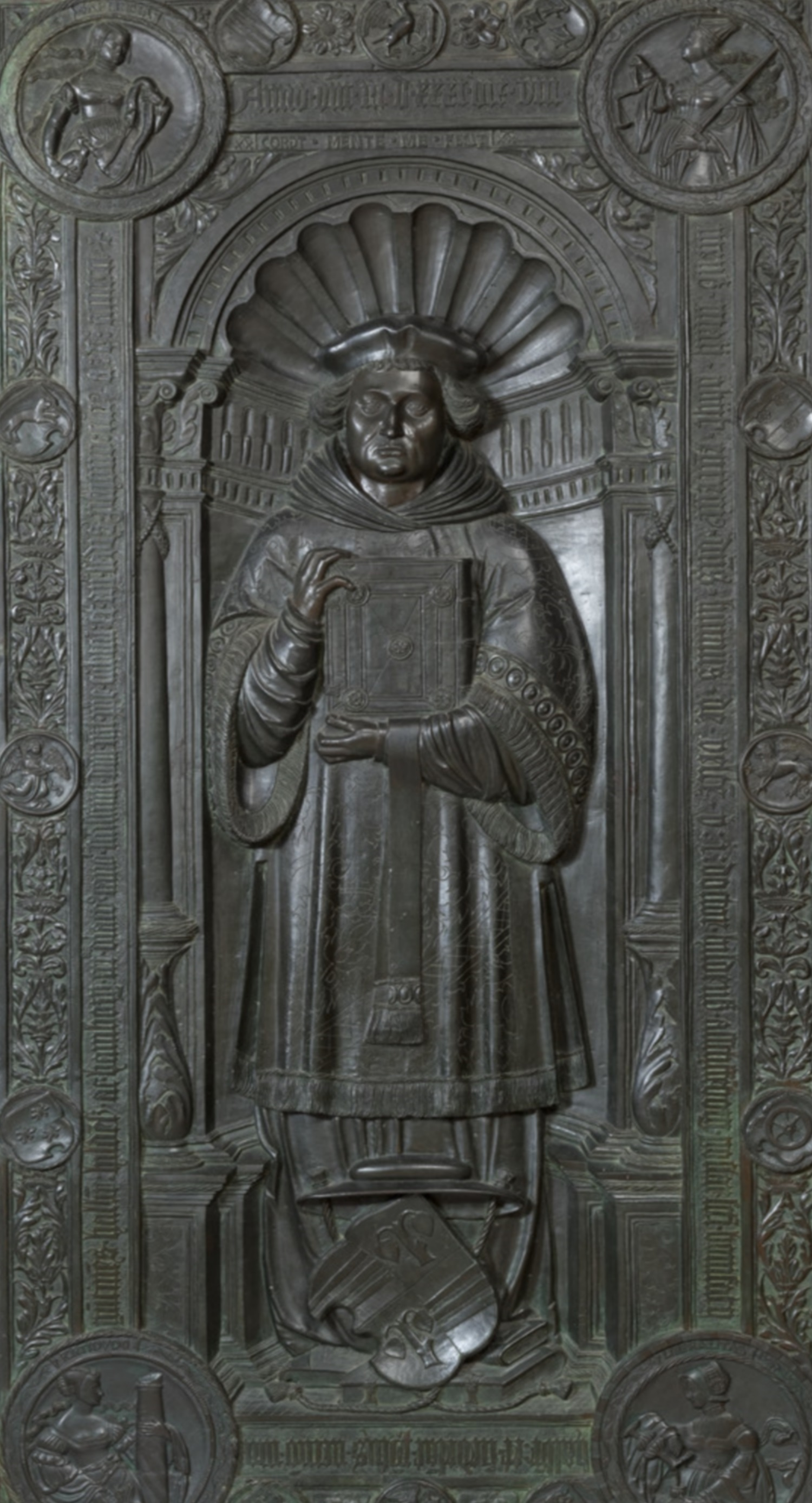 Livinius von Veltheim, Epitaph, Skulptur, Bronze, Hildesheim, Dom, St. Maria, Kapelle der heiligen drei Könige